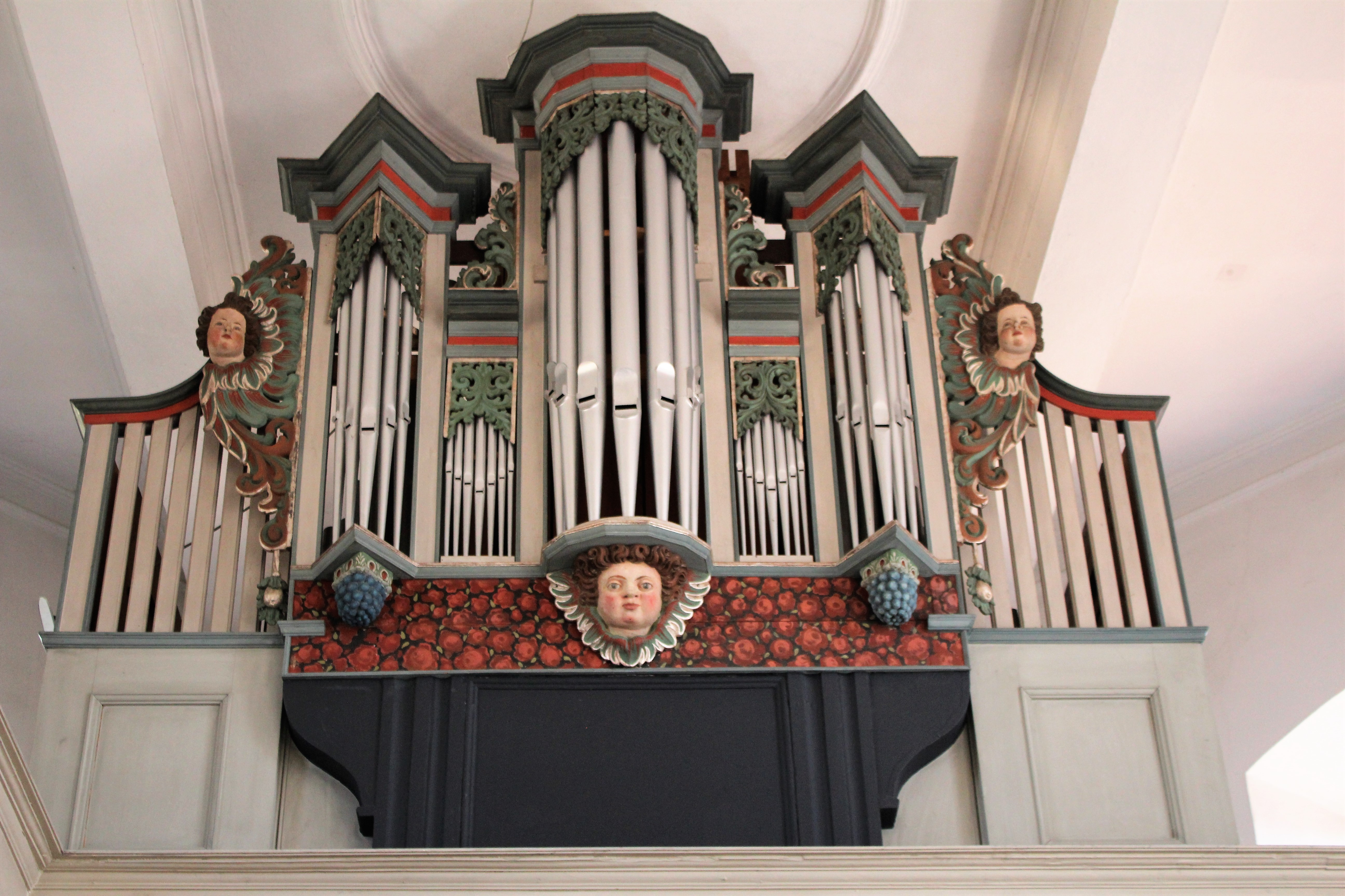 Evangelische Kirche Wallernhausen, Nidda, Wetteraukreis, Hessen, Deutschland